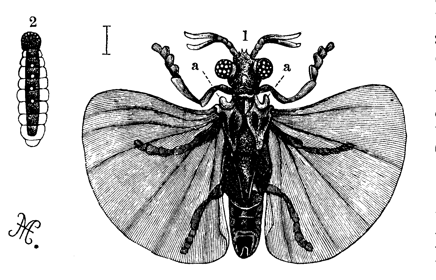 Fächerflügler - Laut Beschriftung: 1) Pecks Immenbremse (Xenos Peckii), Männchen: a verkümmerte Vorderflügel (Halteren). 2) Rossis Immenbremse (Xenos Rossii), Weibchen von der Bauchseite